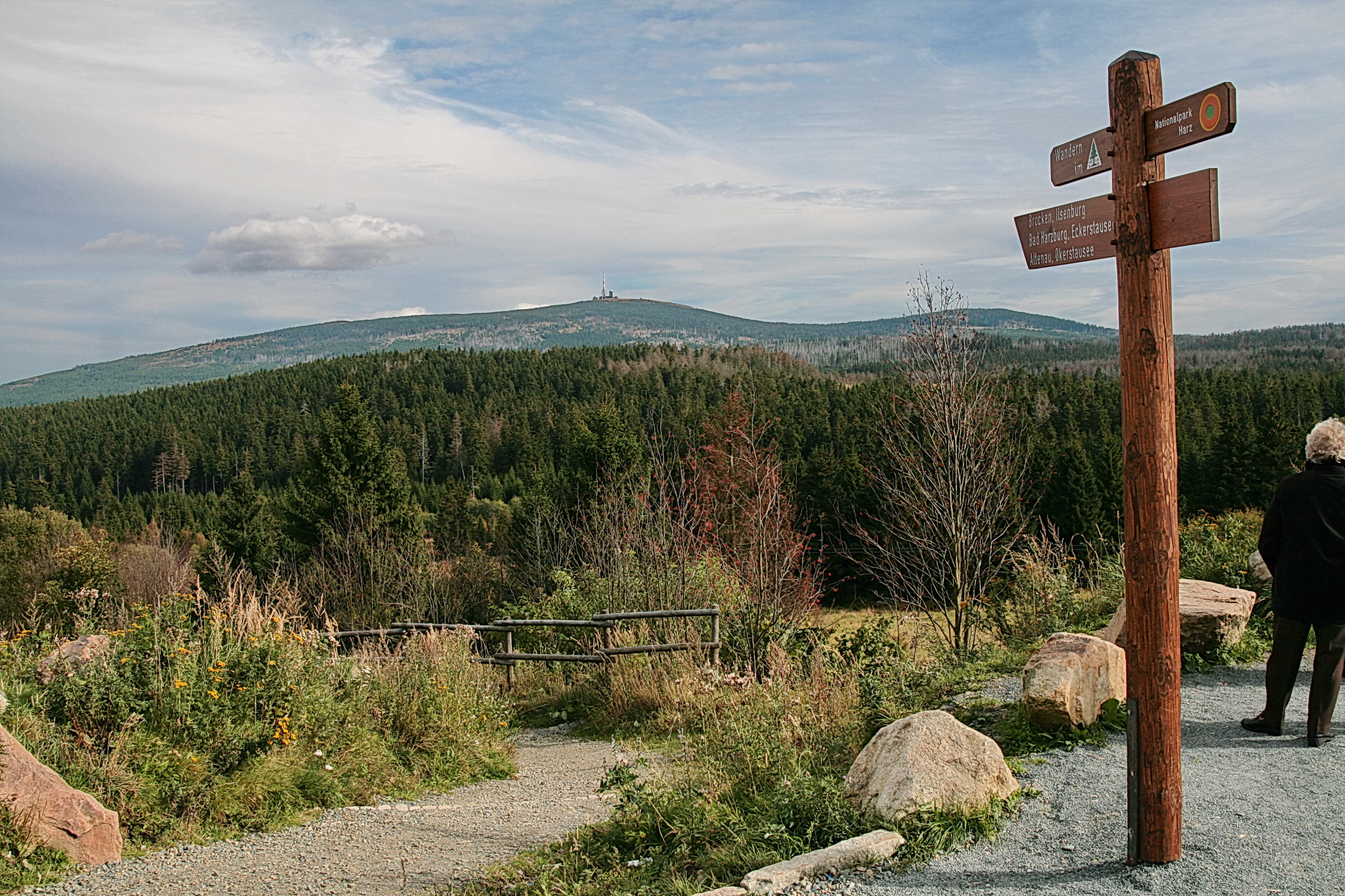 Torfhaus im Harz in Niedersachsen, Deutschland